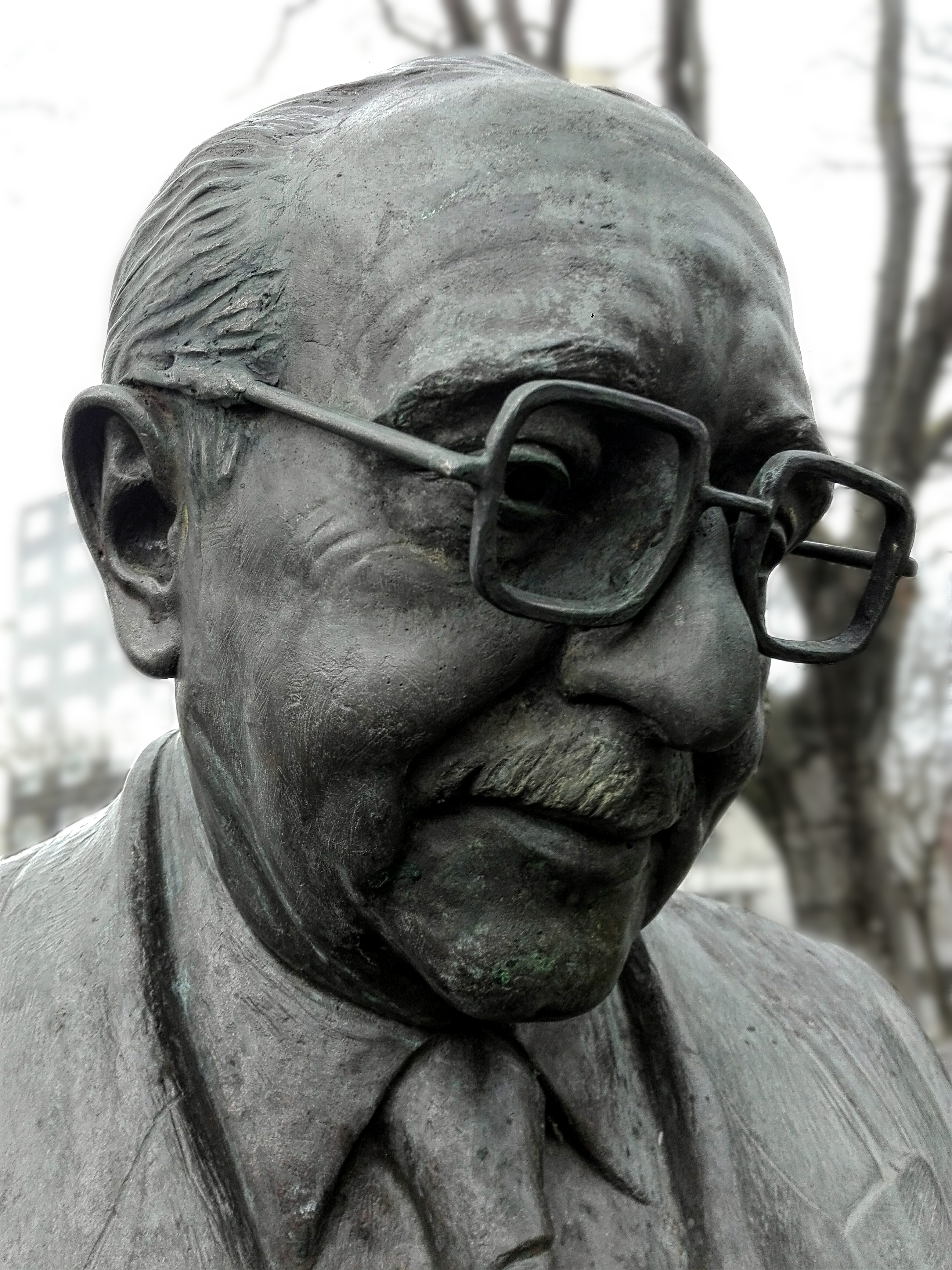 Estatua de José Joaquín Arazuri por Rafael Huerta en Pamplona. Reparado con gafas